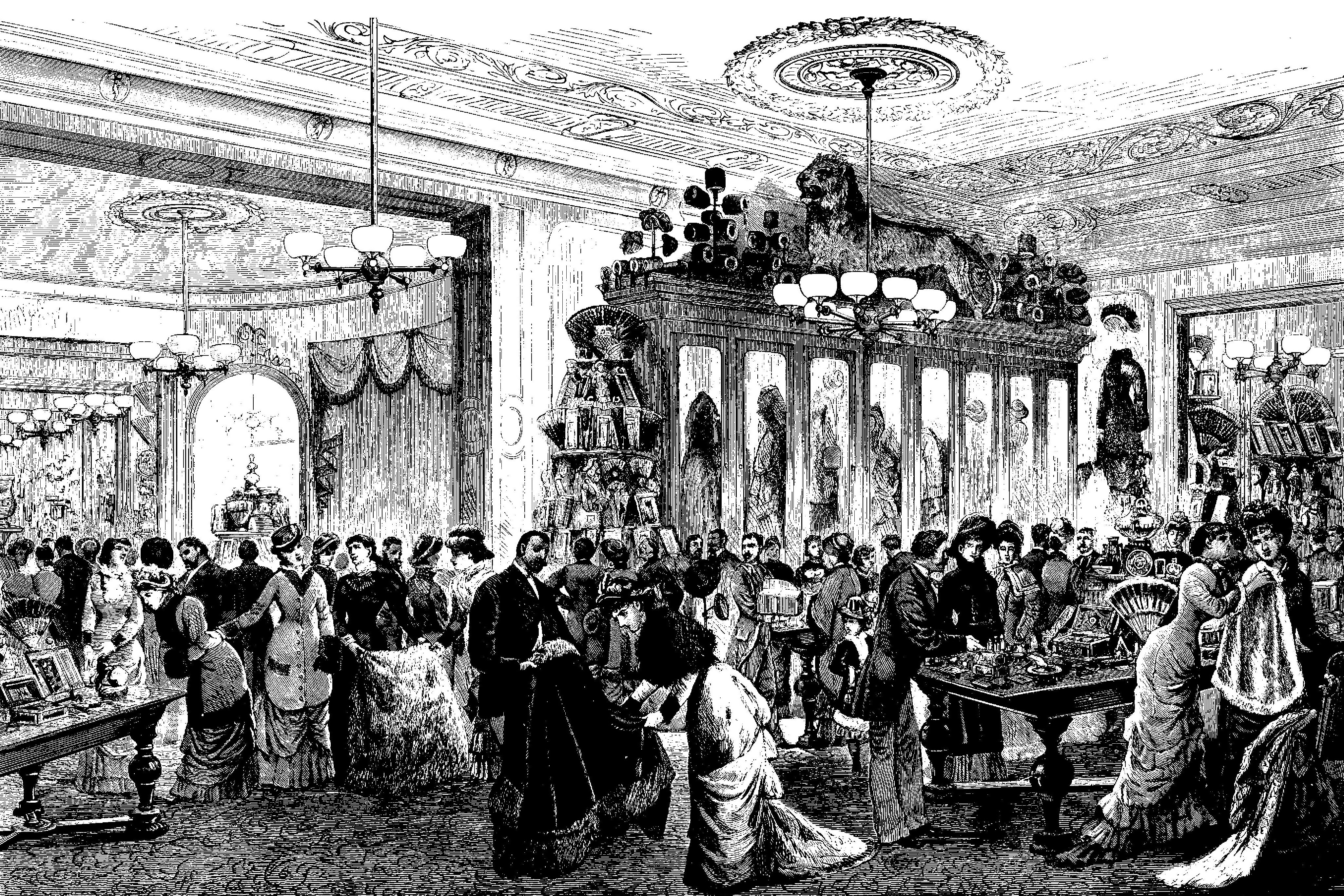 Tegning, Juleudstilling 1880